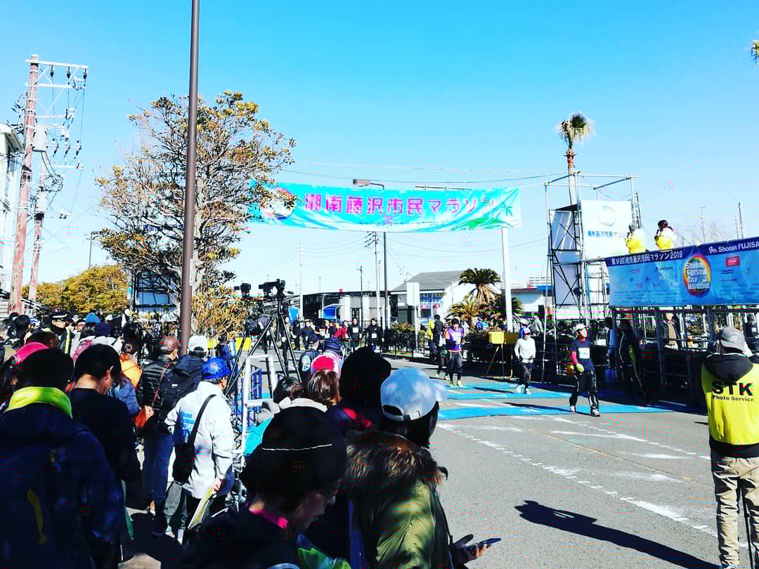 湘南藤沢市民マラソン ２０１９年１月２７日